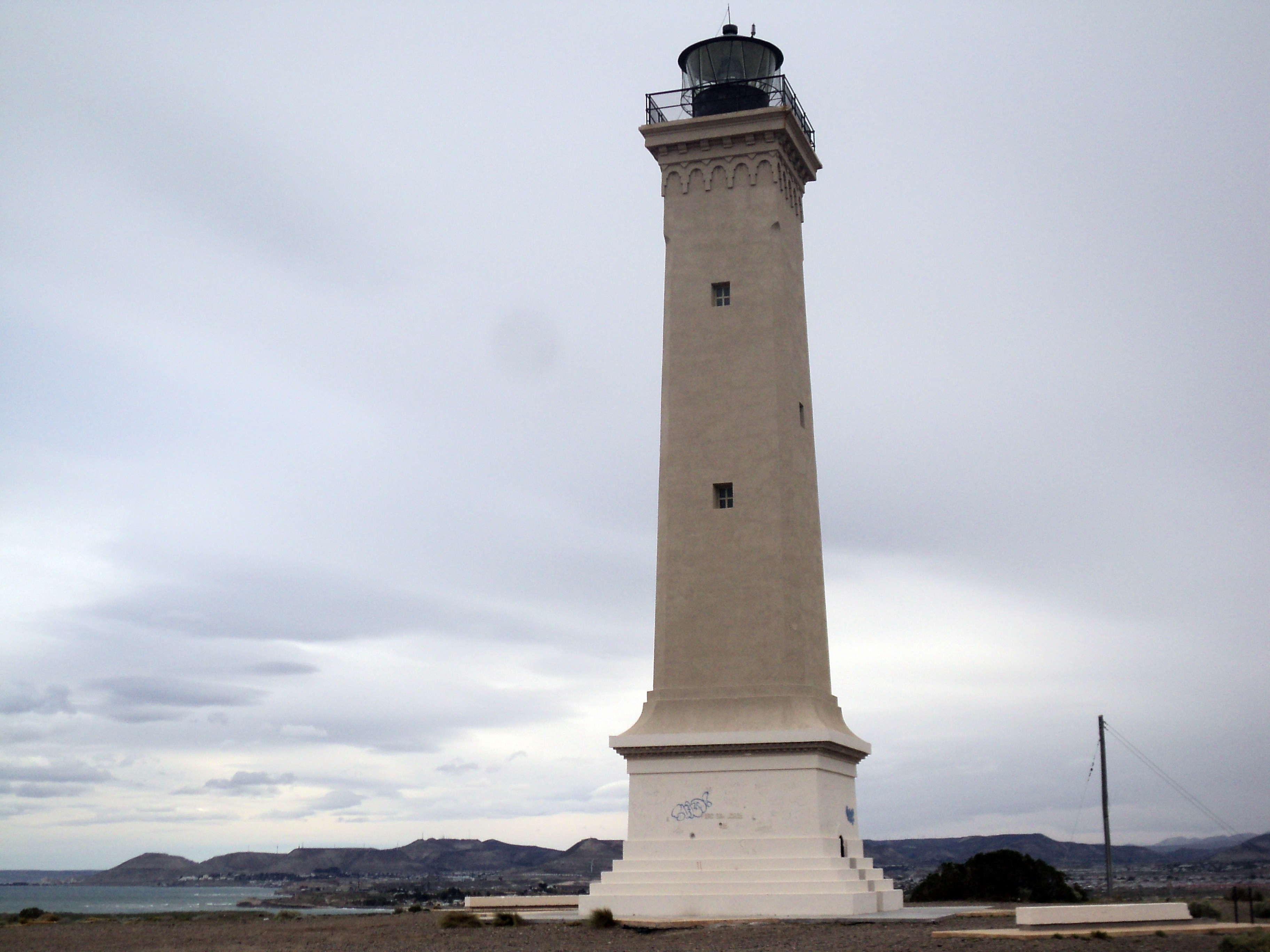 El faro con la ciuda de Comodoro detrás